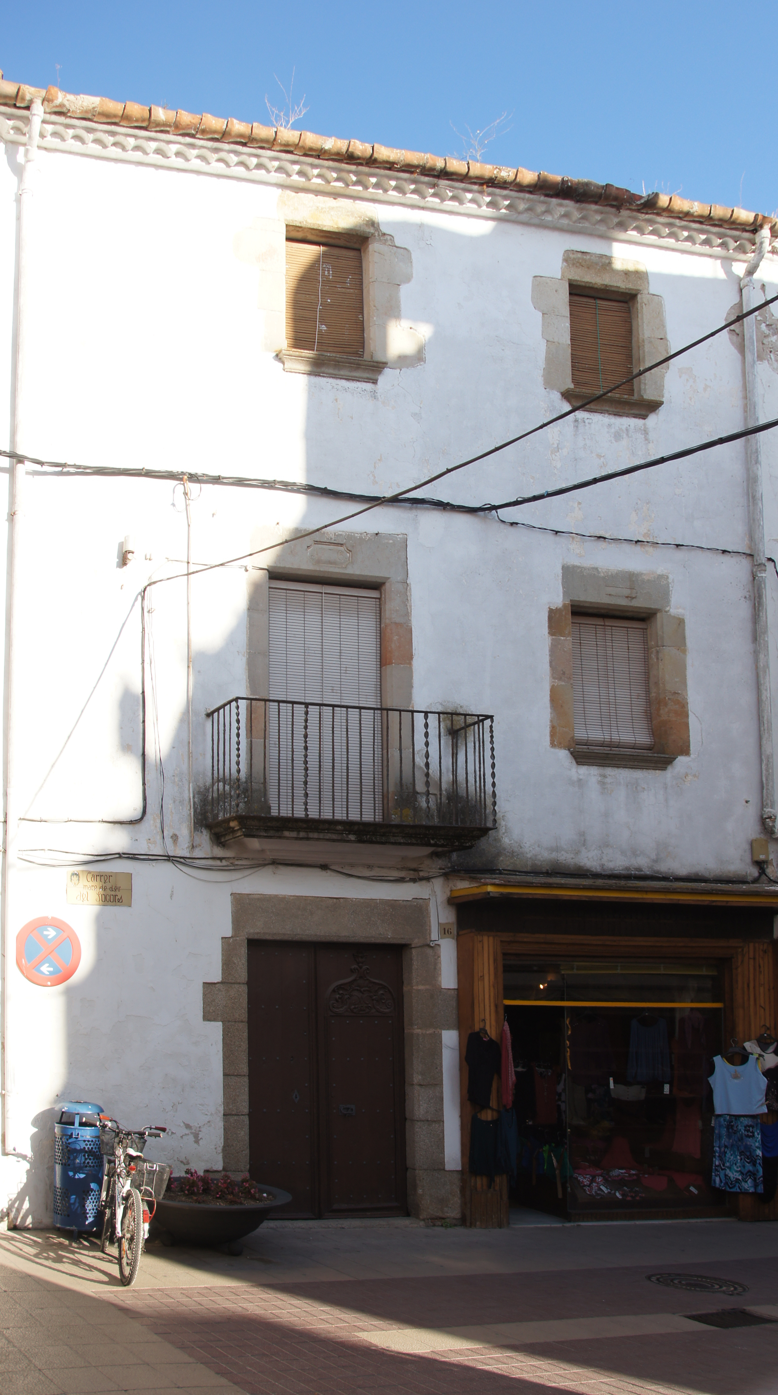 Tossa, Habitatge al carrer del Socors 16